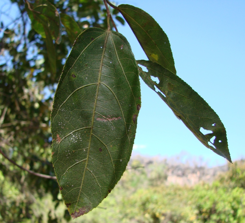 Guazuma ulmifolia - MALVACEAE Parque Estadual Terra Ronca - São Domingos - Goiás - Brasil.